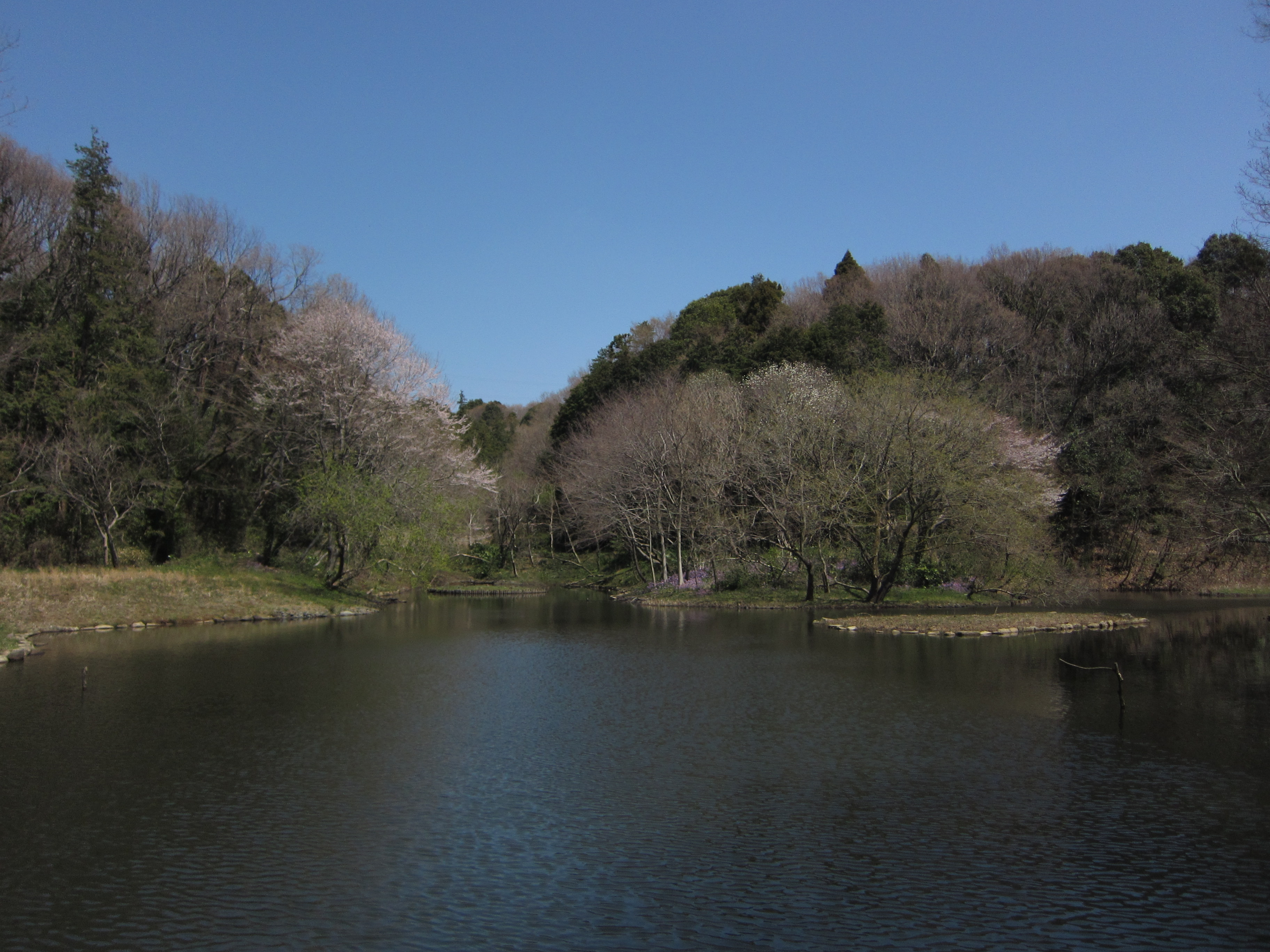 座間谷戸山公園：水鳥の池